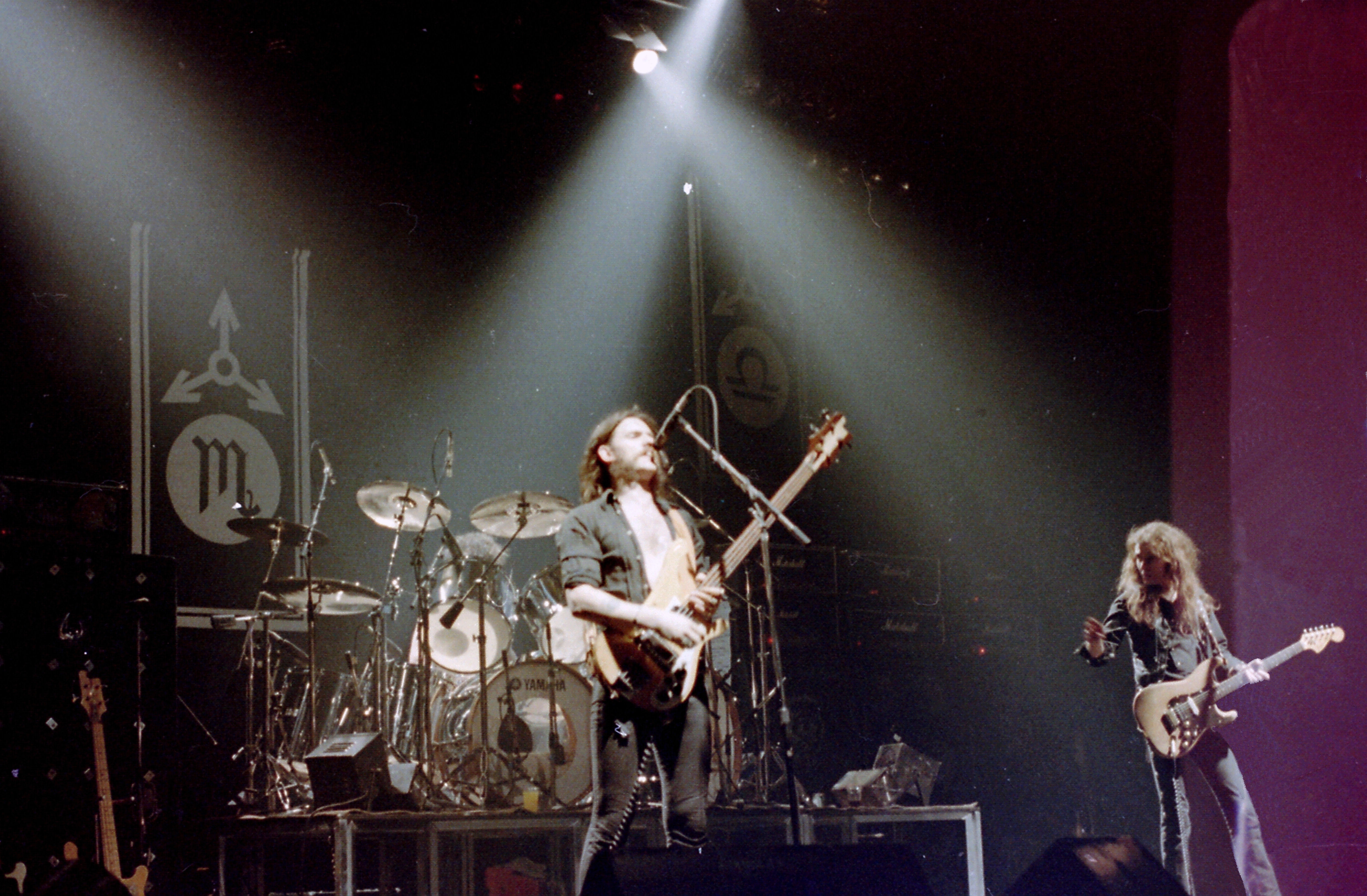 Motörhead actuando en Gales en 1982.